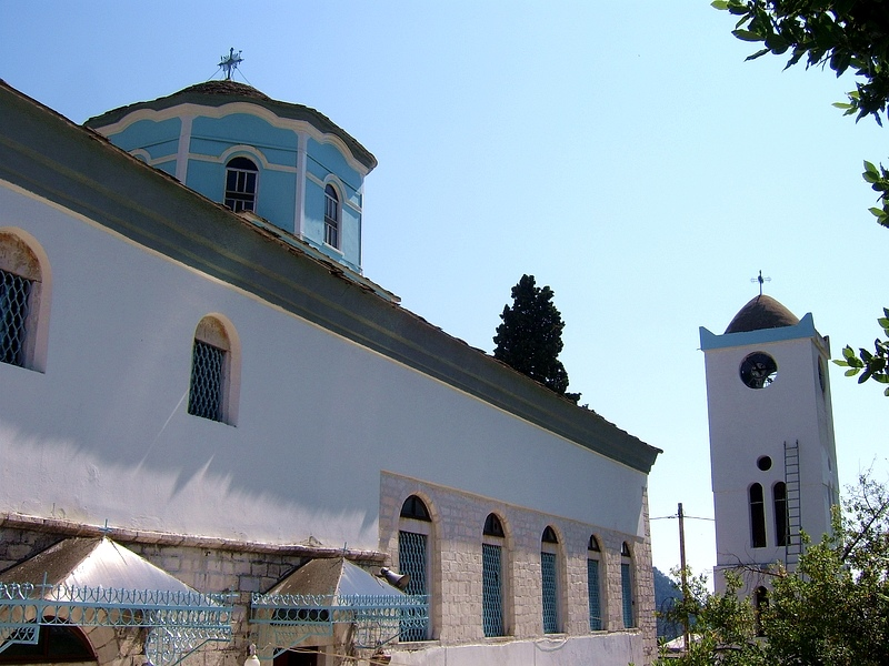 Thassos / Tasos / Θάσος / Тасос